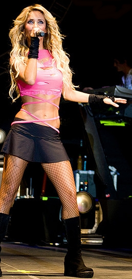 Anahí durante um show em 2008.